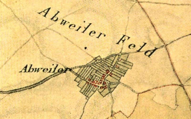 Kartenaufnahme der Rheinlande 1803-1820